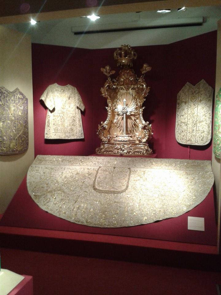 tdg